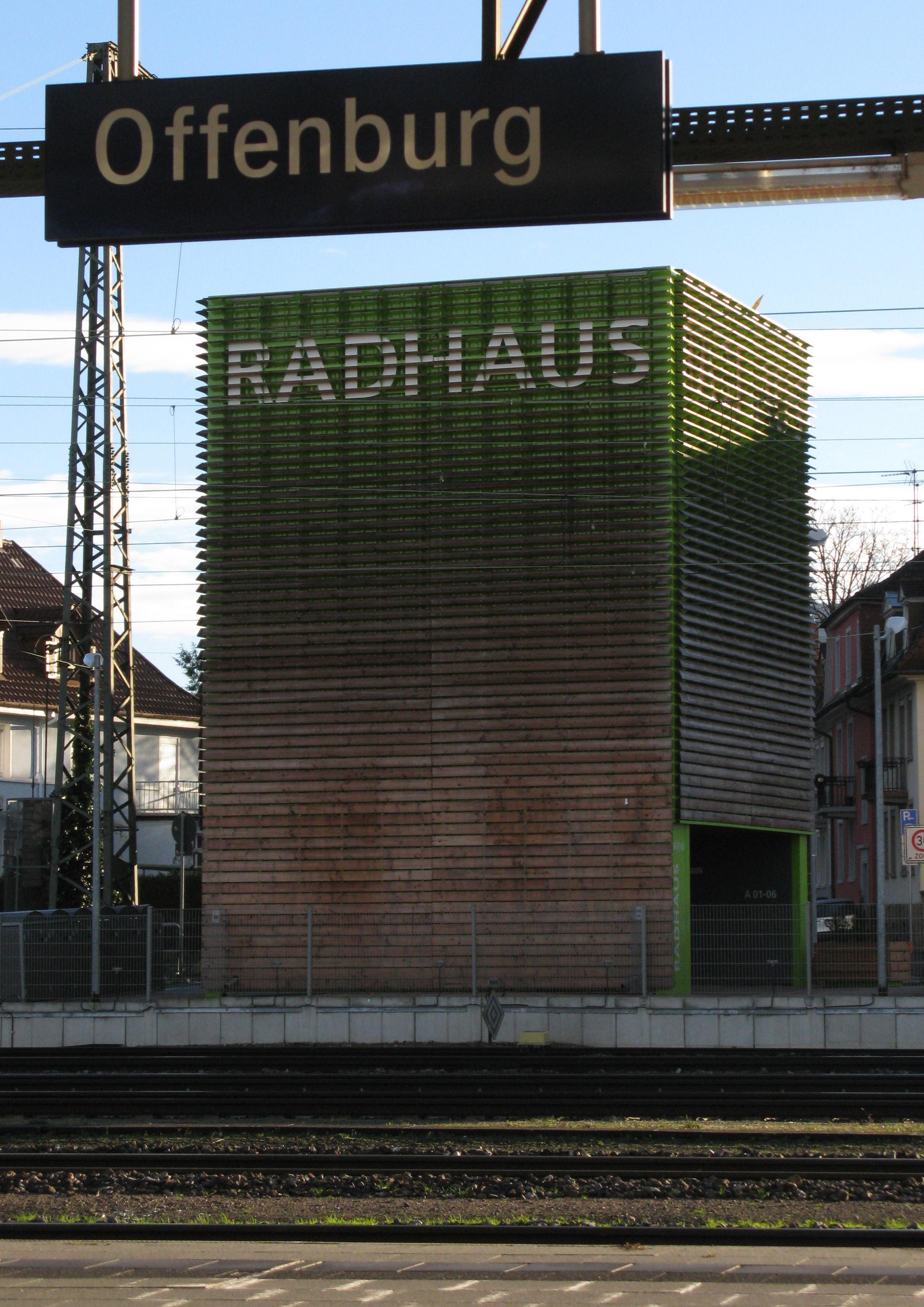 Radhaus Offenburg am Hauptbahnhof